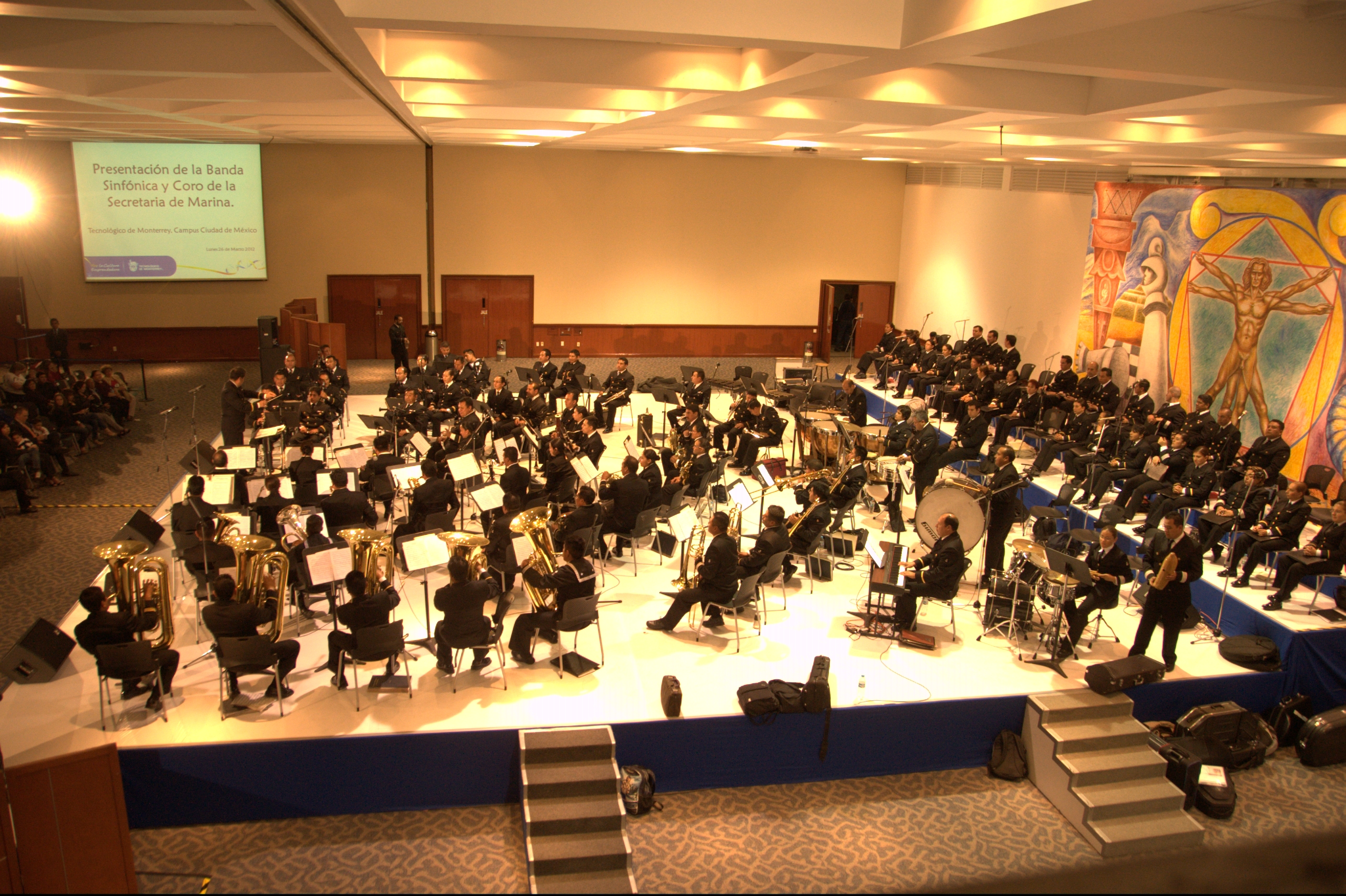 1 Orquesta sinfónica y Coro de la Secretaría de Marina Armada en ITESM Campus Ciudad de México